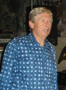 Photo de Max Howard en septembre 2010